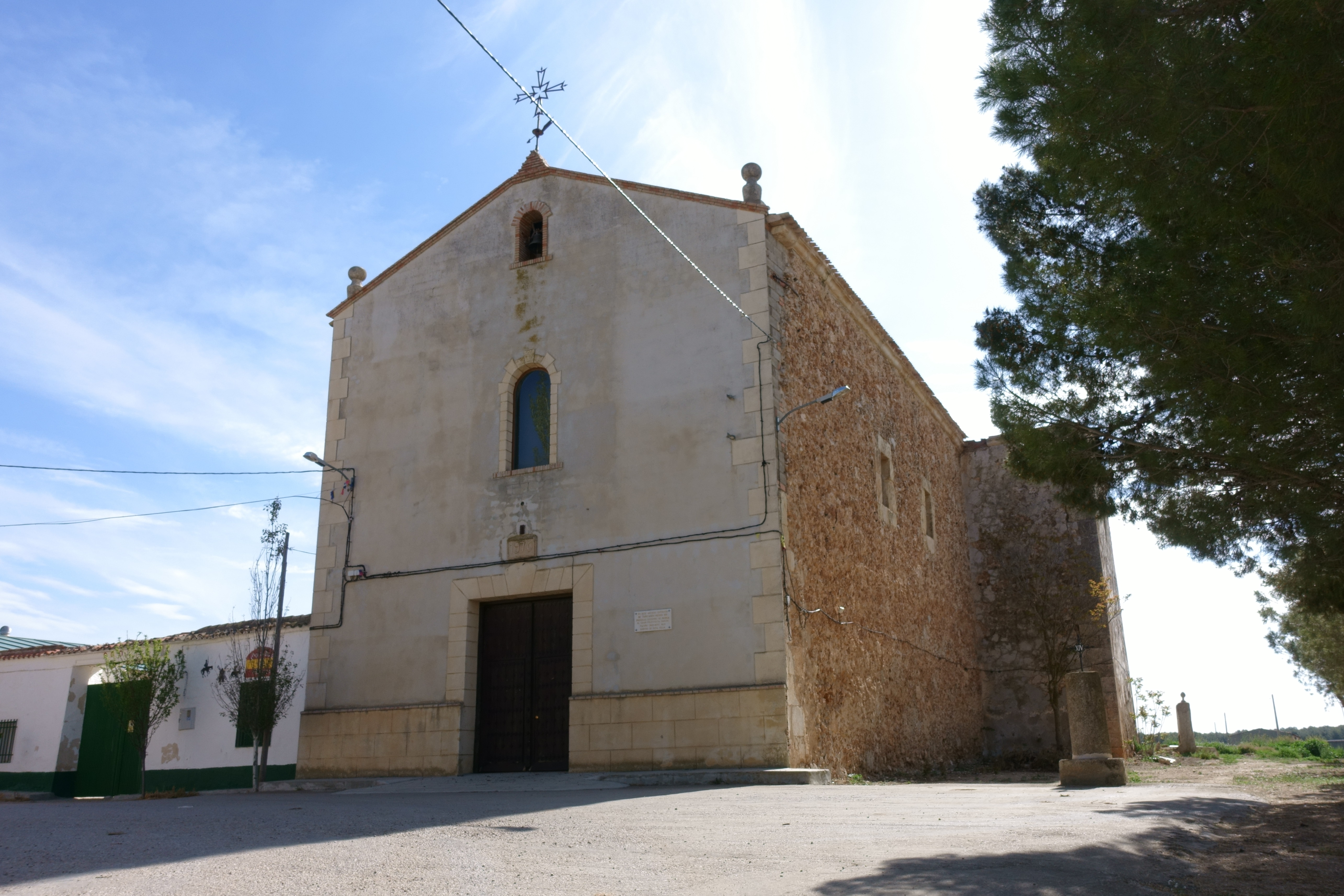 Convento Trinitario en Santa María del Campo Rus (Cuenca, España).